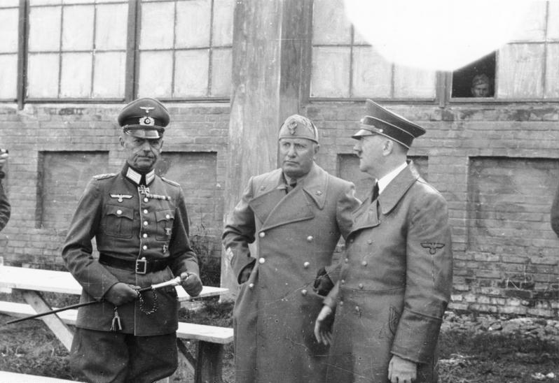 Hitler, Mussolini, Gen.Feld.Marsch.v. Rundtstedt. Anl[äßlich] einer Besichtungsfahrt an der Ostfront